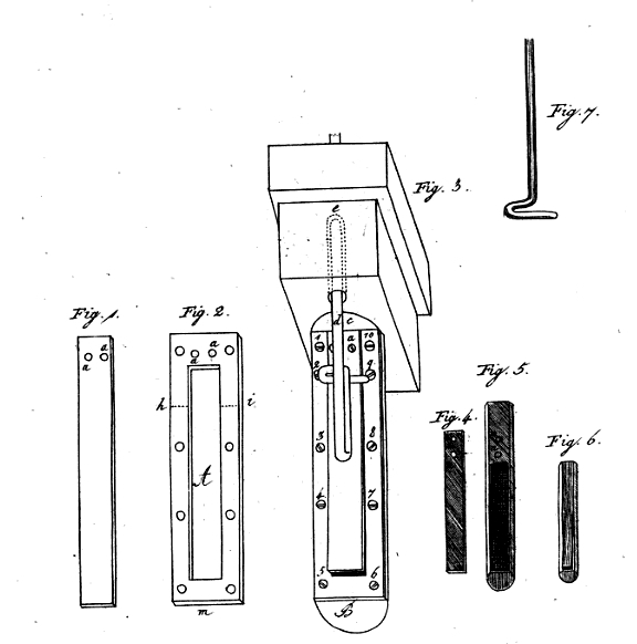 Zeichnung zum Bericht über die Verbesserung der Rohrwerke in der Orgel mit durchschlagenden Zungen, in: Allgemeine musikalische Zeitung, Volume 13, Friedrich Rochlitz, 1811, Dazugehöriger Text Seite 1 Dazugehöriger Text Seite 2 Dazugehöriger Text Seite 3 Dazugehöriger Text Seite 4